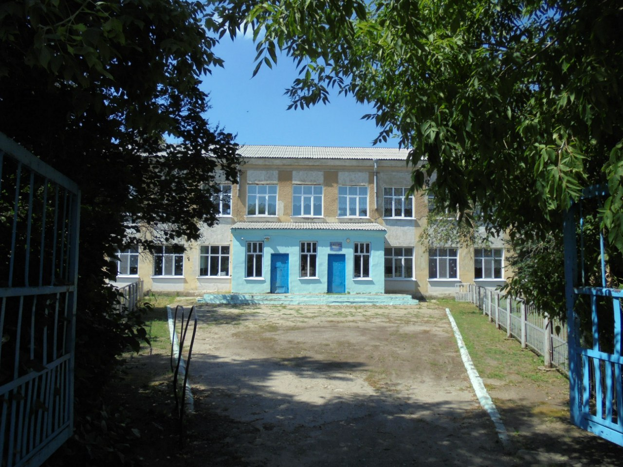 Школа в селе Малиновка Аркадакского района Саратовской области